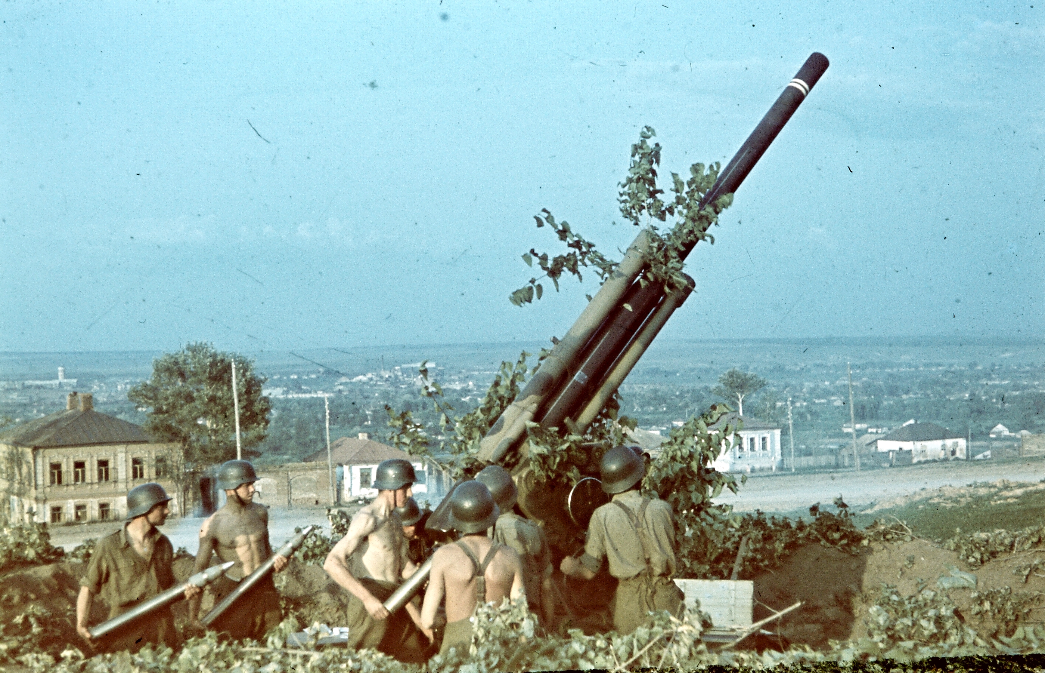 29M Bofors 80mm-es légvédelmi ágyú tüzelőállásban. Location: Russia, Stary Oskol Tags: colorful, picture, ordnance, second World War, soldier, summer Title: 29M Bofors 80mm-es légvédelmi ágyú tüzelőállásban.